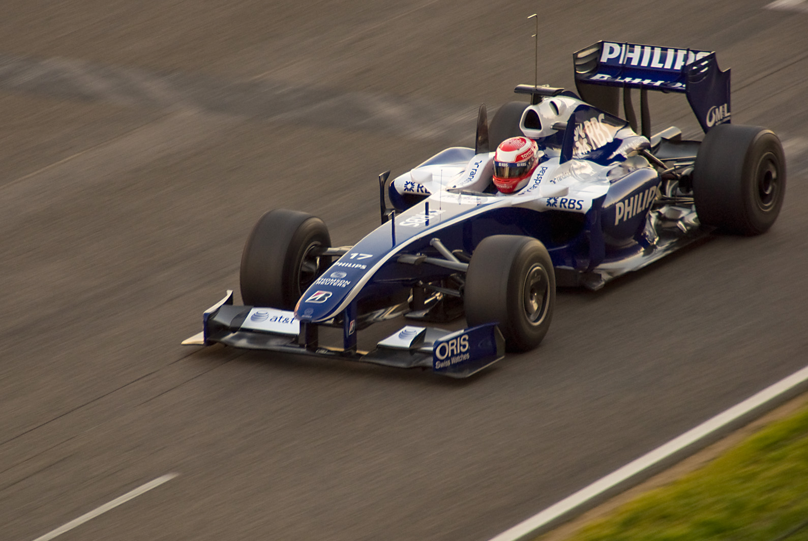 Nikon D90 + Sigma 18-200 DC OS HSM 1/320s - F/7.1 - 200mm - ISO200